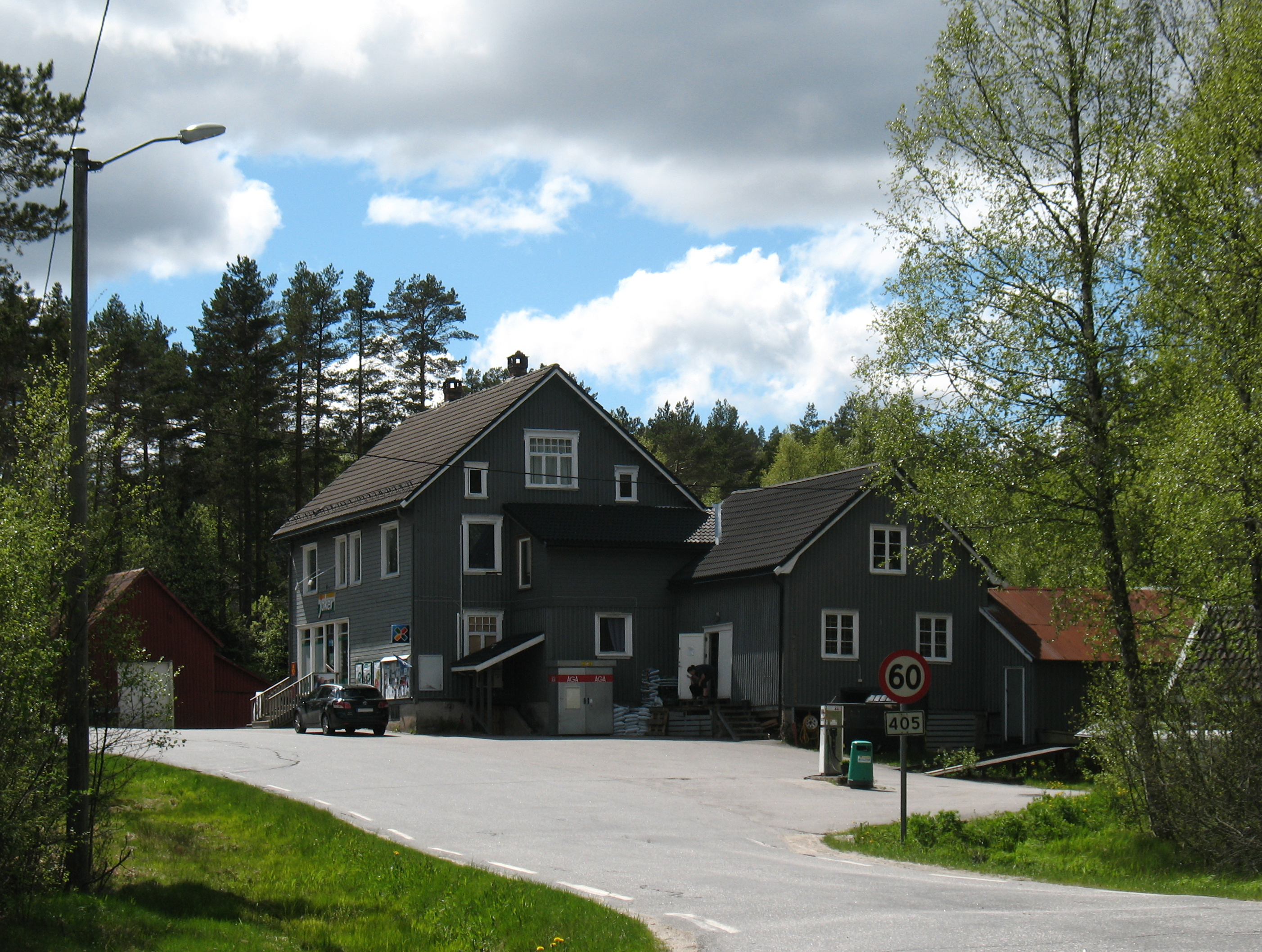 Myrvoll, Vatnestrømsveien 87 på Vatnestrøm i Iveland, Aust-Agder. I 2015 holder Joker til i bygningen, men fra ble oppført i 1932–1994 holdt Vatnestrøm Samvirkelag til her. Gnr 20/63.